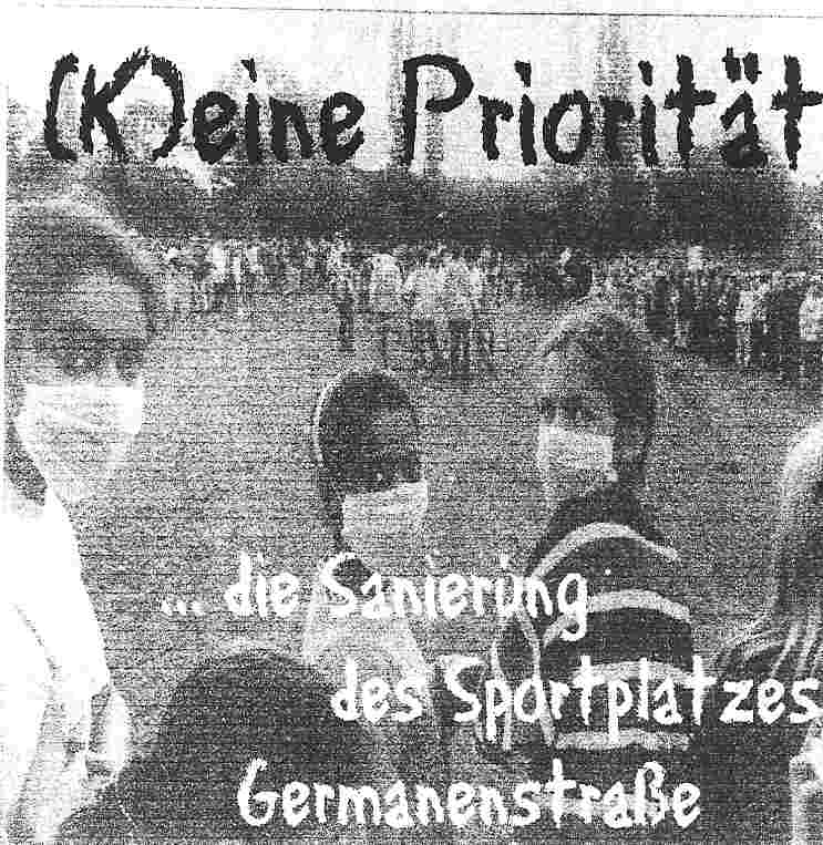 Plakat für die Sanierung des Sportplatzes der Gesamtschule Bonn-Bad Godesberg im Oktober 1999